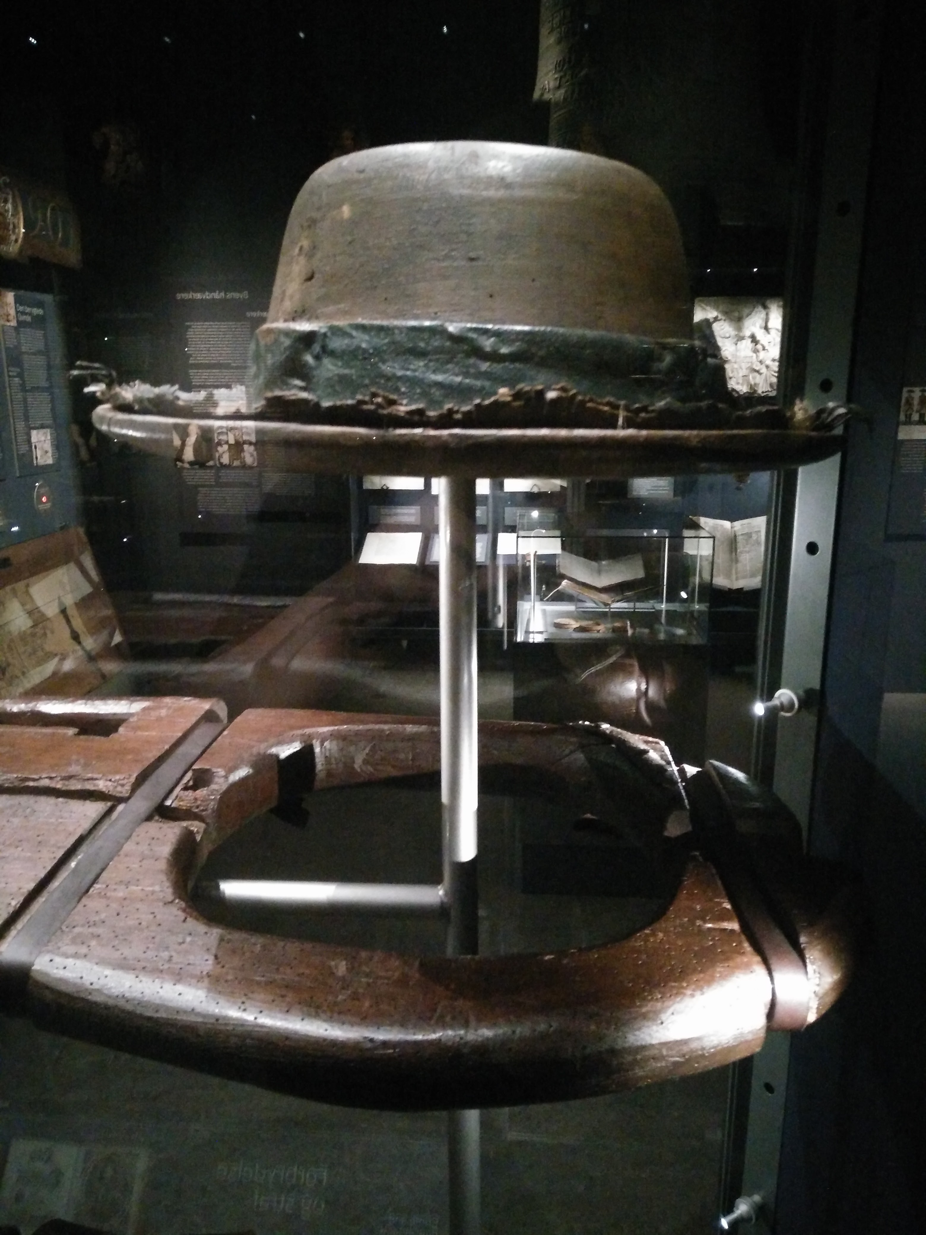 Spottehat udstillet på Museum Østjylland i Randers. Hatten er i følge museets genstandstekst fremstillet i 1777 af bødkeren Søren Glas. (Genstanden nedenunder er en gabestok, som ikke er en del af hatten)